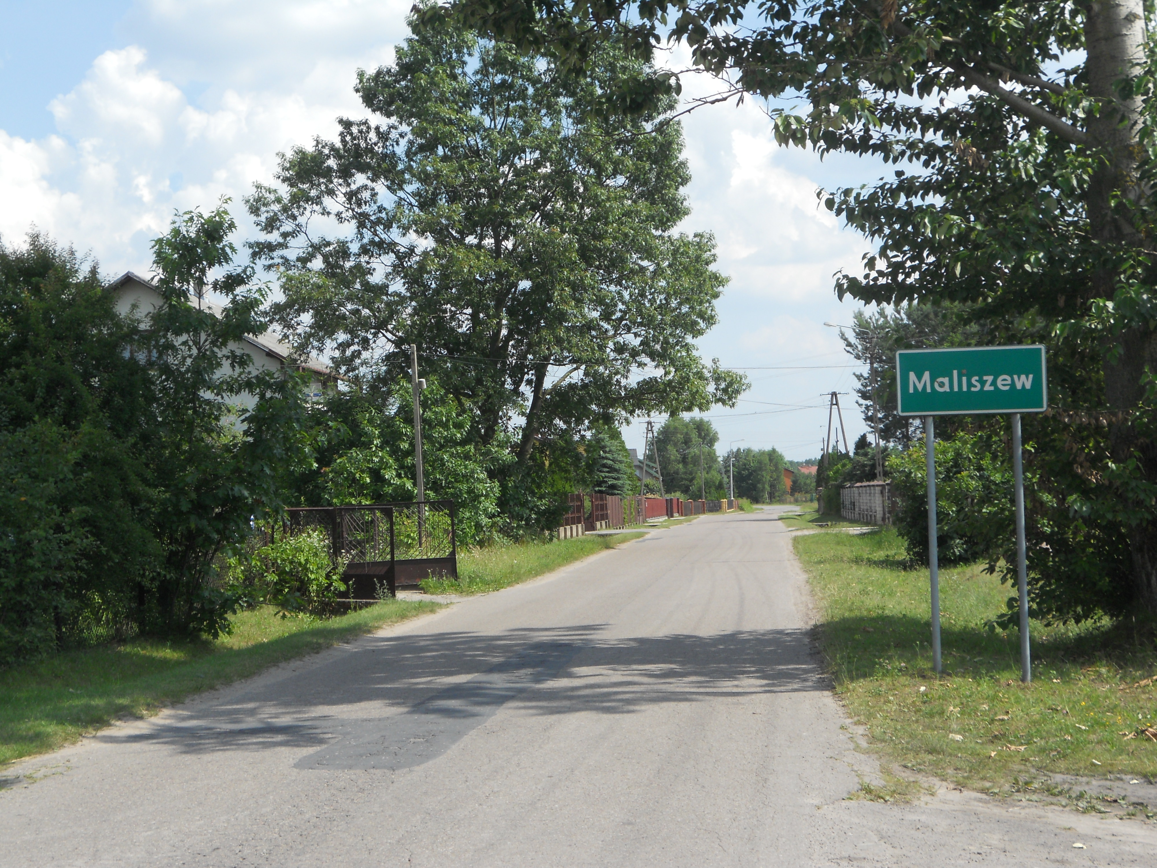 Wjazd do Maliszewa z Zamienia